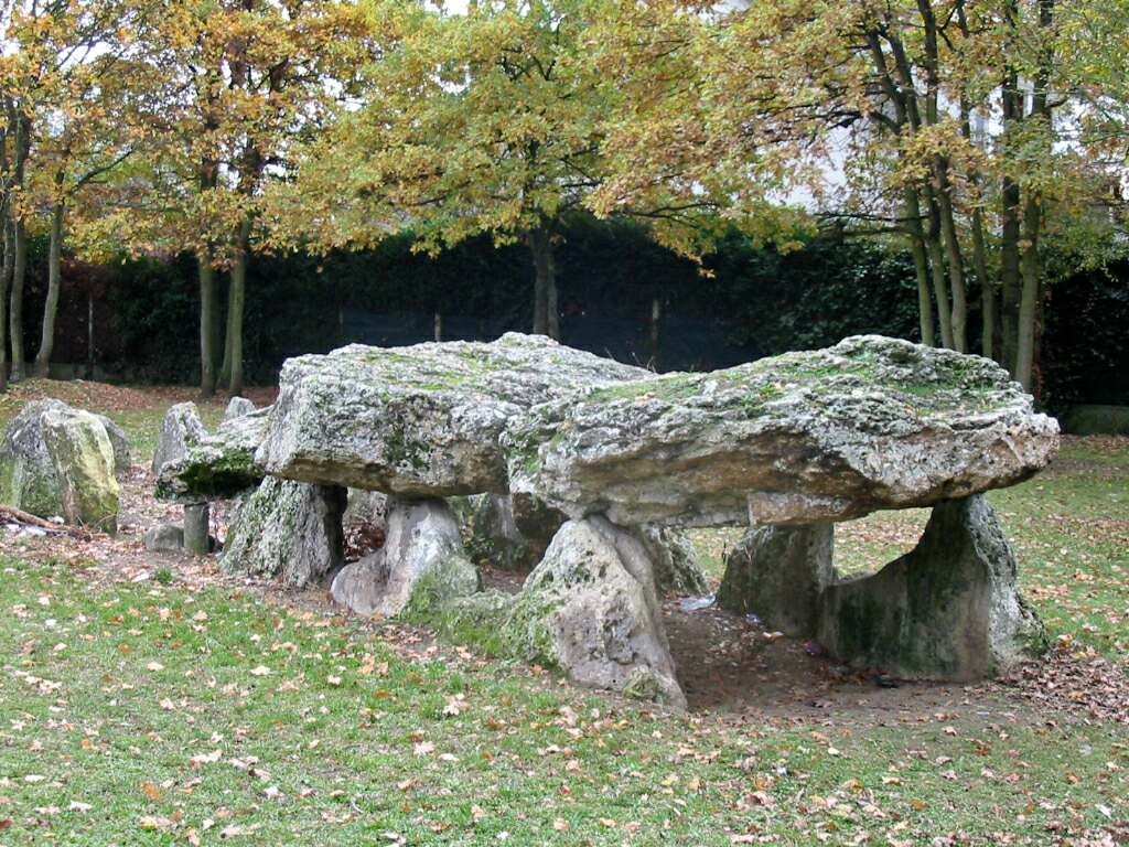 Allée de la Justice 786802